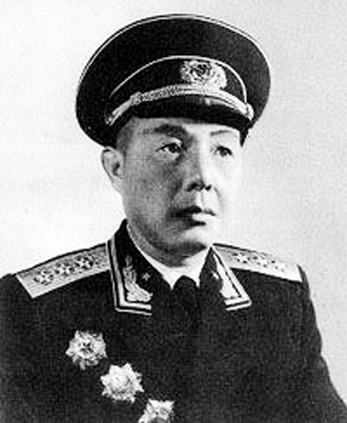 苏振华授衔照